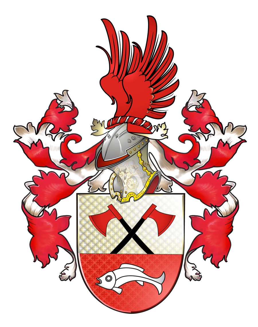 herb rodowy Joshki Fischera